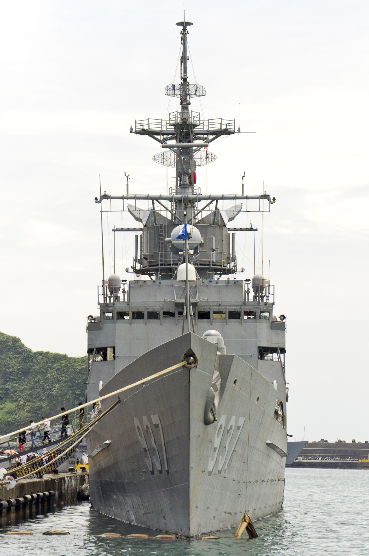 中華民國海軍淮陽軍艦停泊中正軍港。